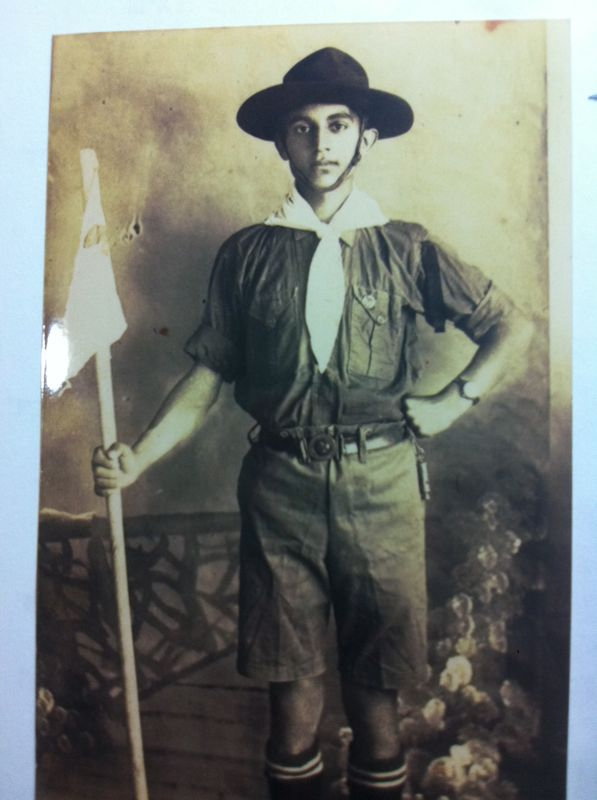 משה ניסני במדי "הנוער העובד" ירושלים, 1922